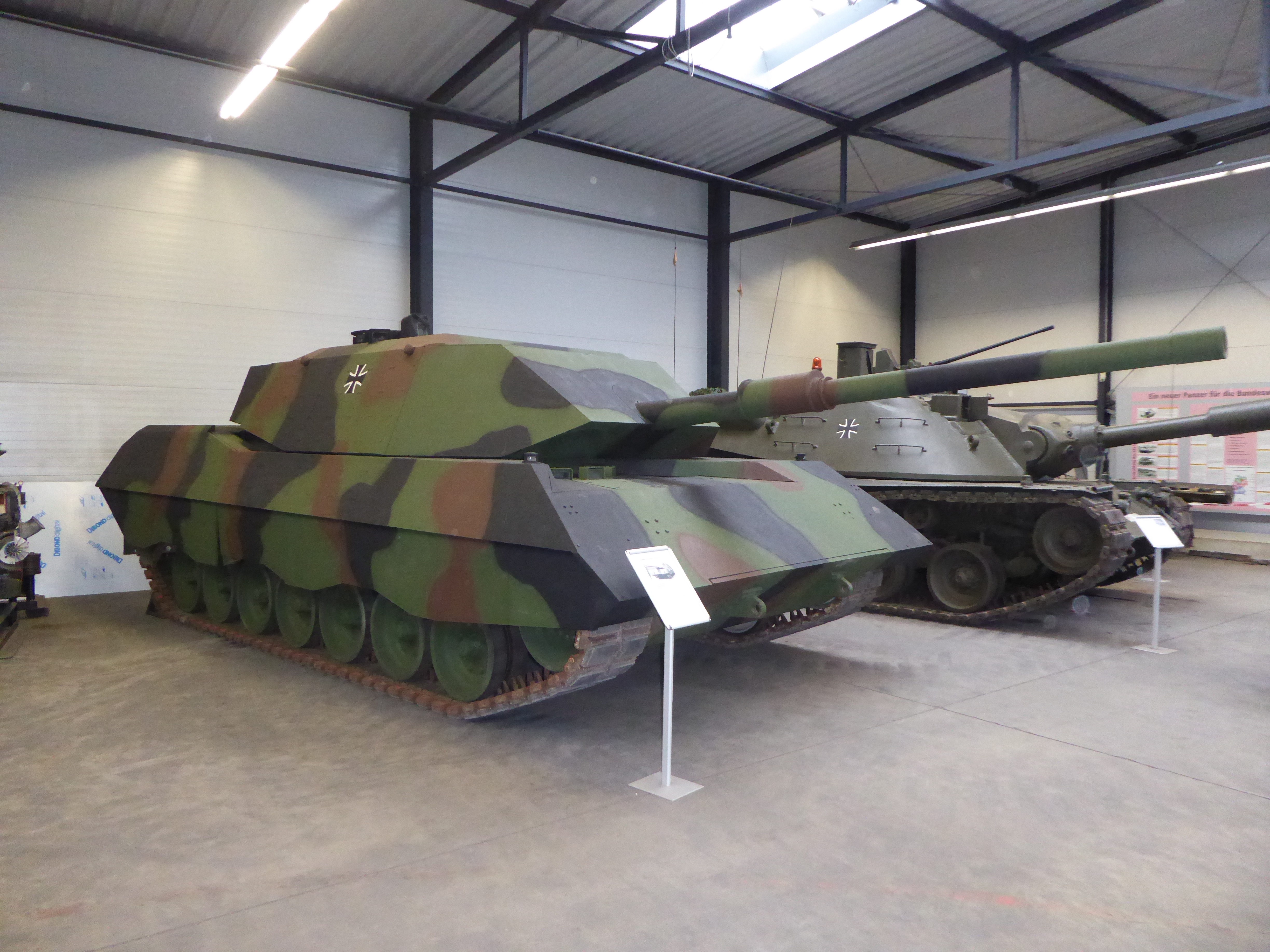 Prototyp und zugleich einzige gebaute Einheit des Panzer VTGS, ausgestellt im Panzermuseum Munster, März 2019